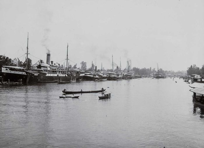 foto. Schepen van de KPM langs de kade aan de Martapura-rivier, Bandjermasin